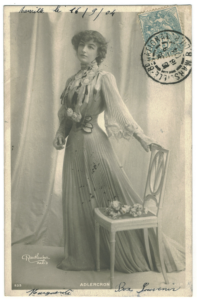 Bildnis einer jungen Dame ("Marguerite"?), verschickt als Postkarte von Marseille am 16. September 1904